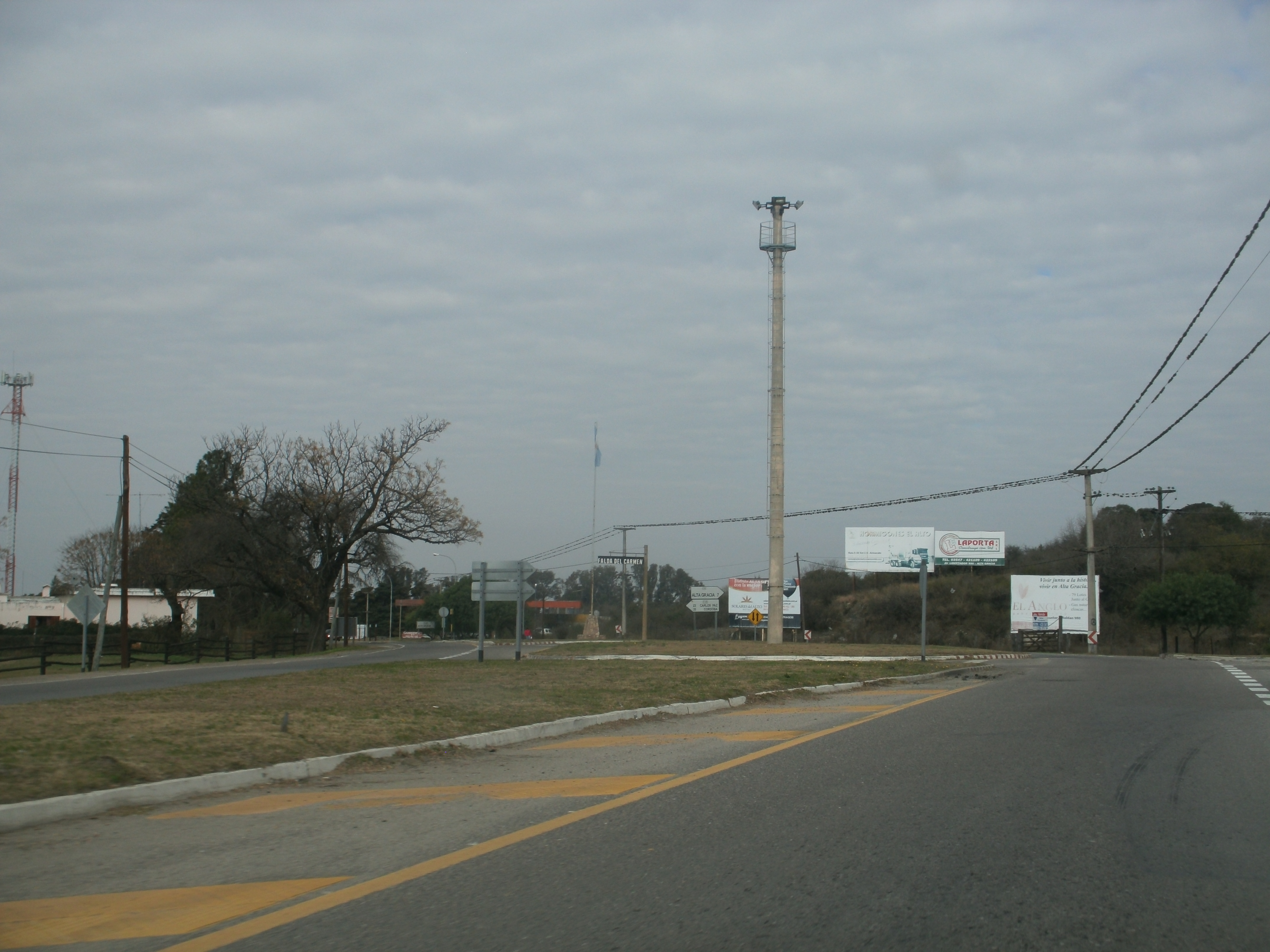 Entrada a la localidad